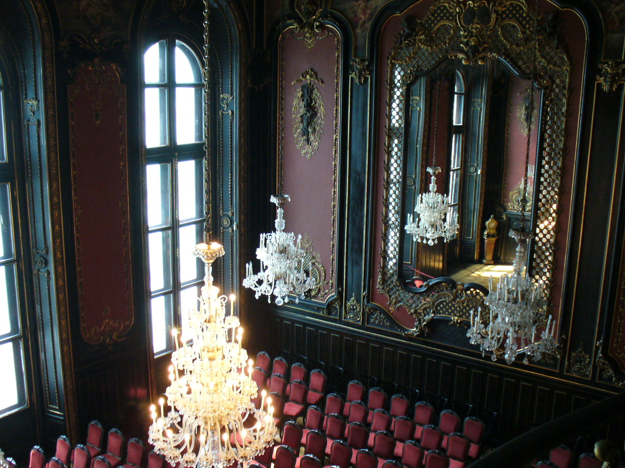 Sala Lustrzana na zamku pszczyńskim